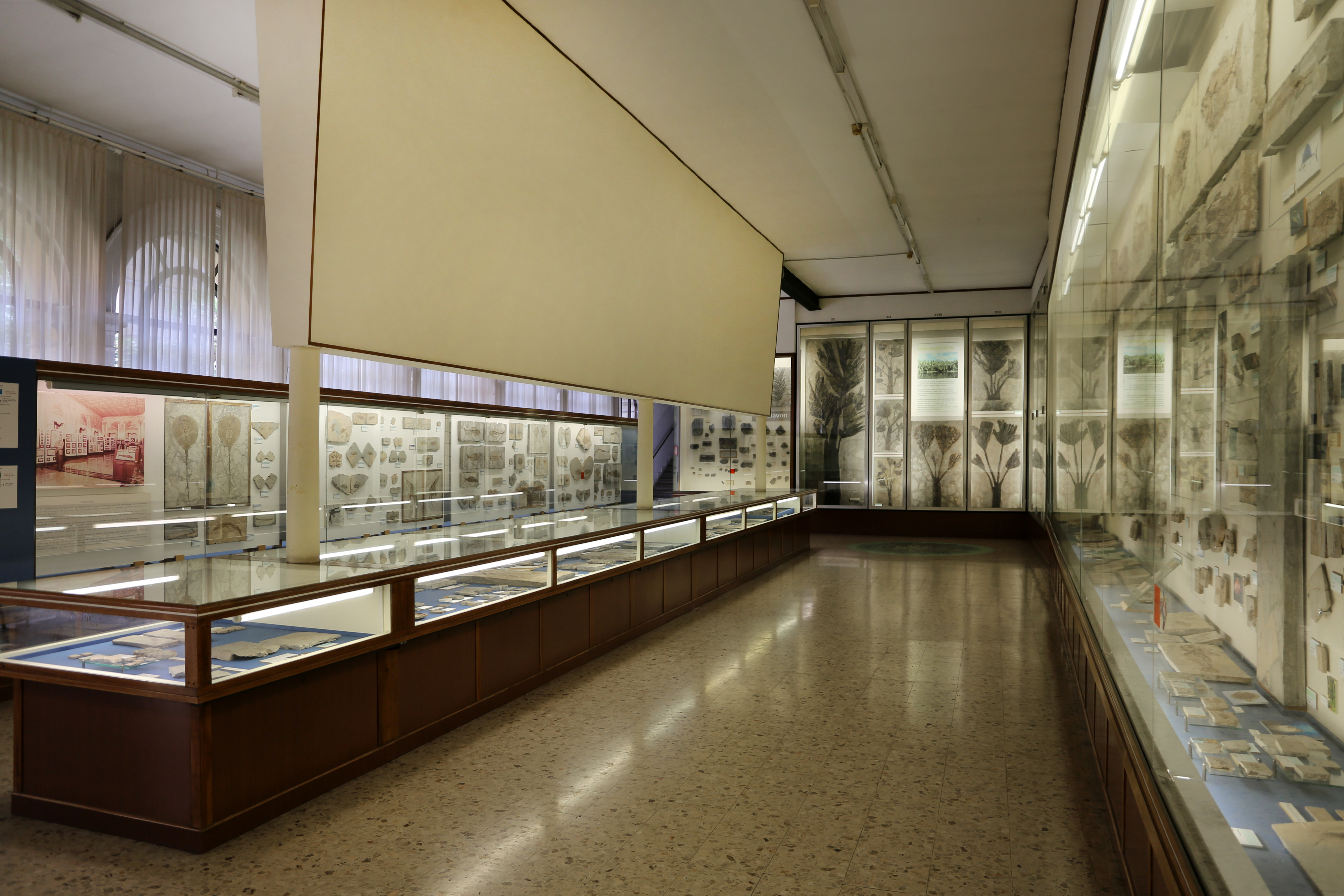 Museo civico di storia naturale di Verona This is a photo of a monument which is part of cultural heritage of Italy.